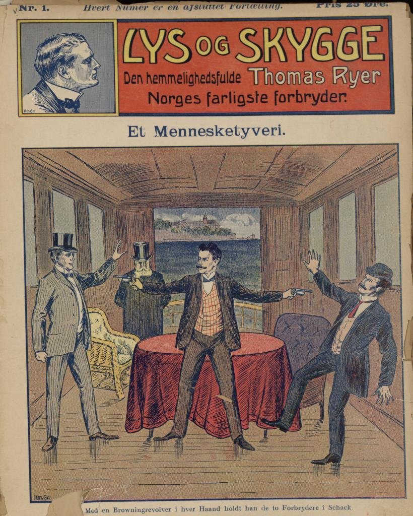 ”Med en Browningrevolver i hver Haand holdt han de to Forbrydere i Schack.” Forsiden til den aller første Knut Gribb-fortellingen, tegnet av Sverrer Knudsen. Lys og Skygge nr. 1 utkom 9. oktober 1908.